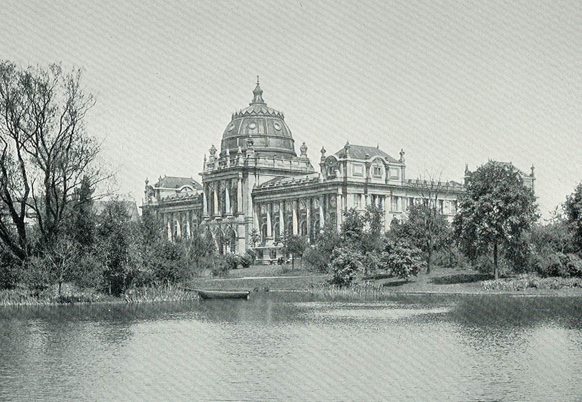 „Hannover – 26 Ansichten nach künstlerischen Aufnahmen“ von Karl F. Wunder. – Provinzial-Museum.